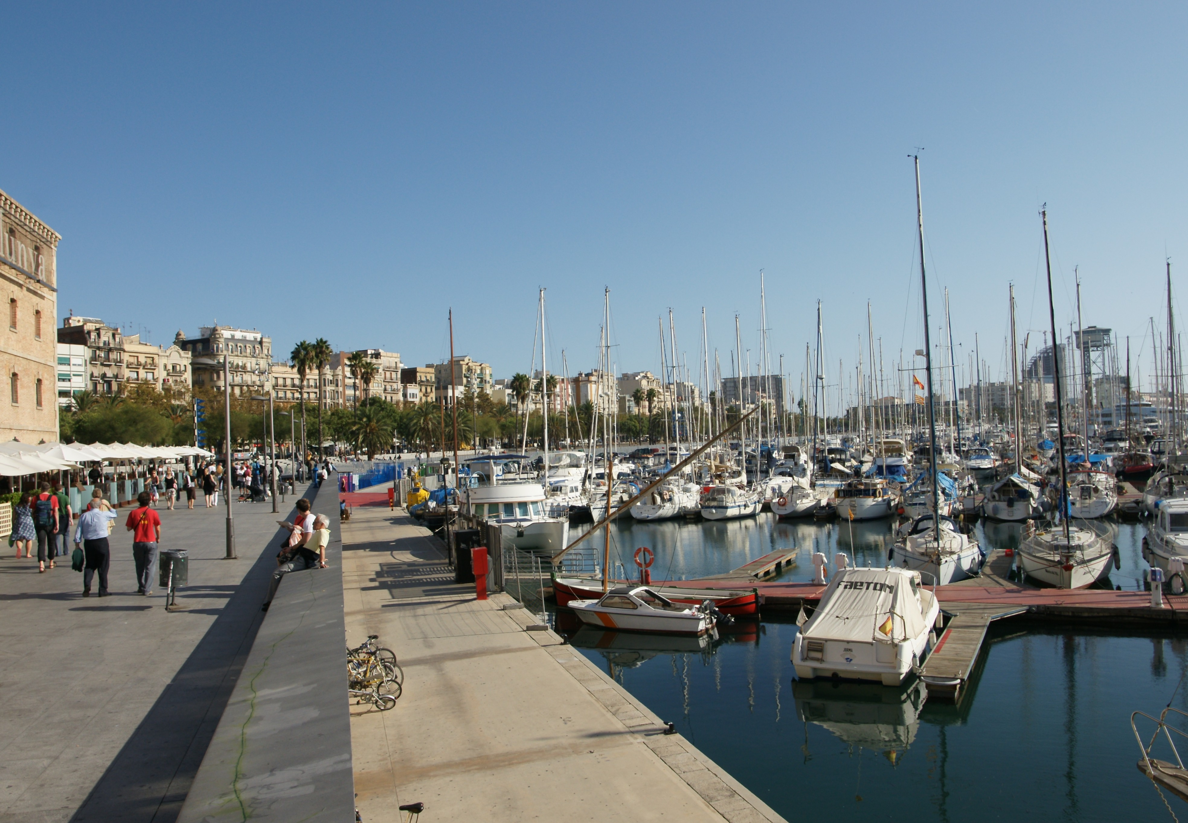 Am Alten Hafen (Port Vell). Blick auf den Stadtteil Barceloneta.